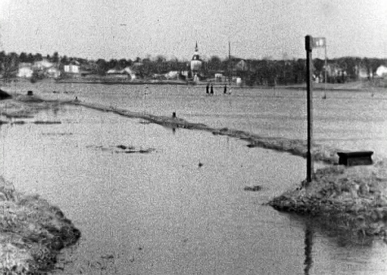 Vattenfyllda Sjöängen nedanför Brännkyrka kyrka